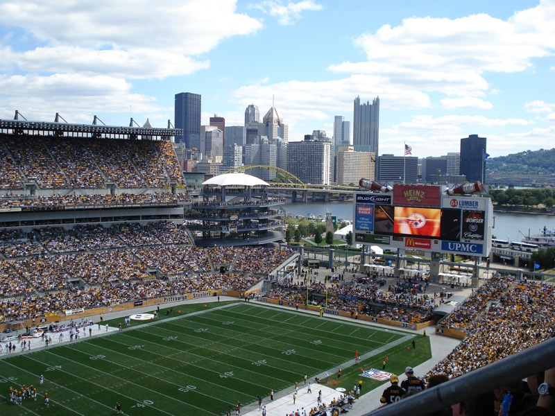 Heinz Field in Pittsburgh, Pennsylvania.